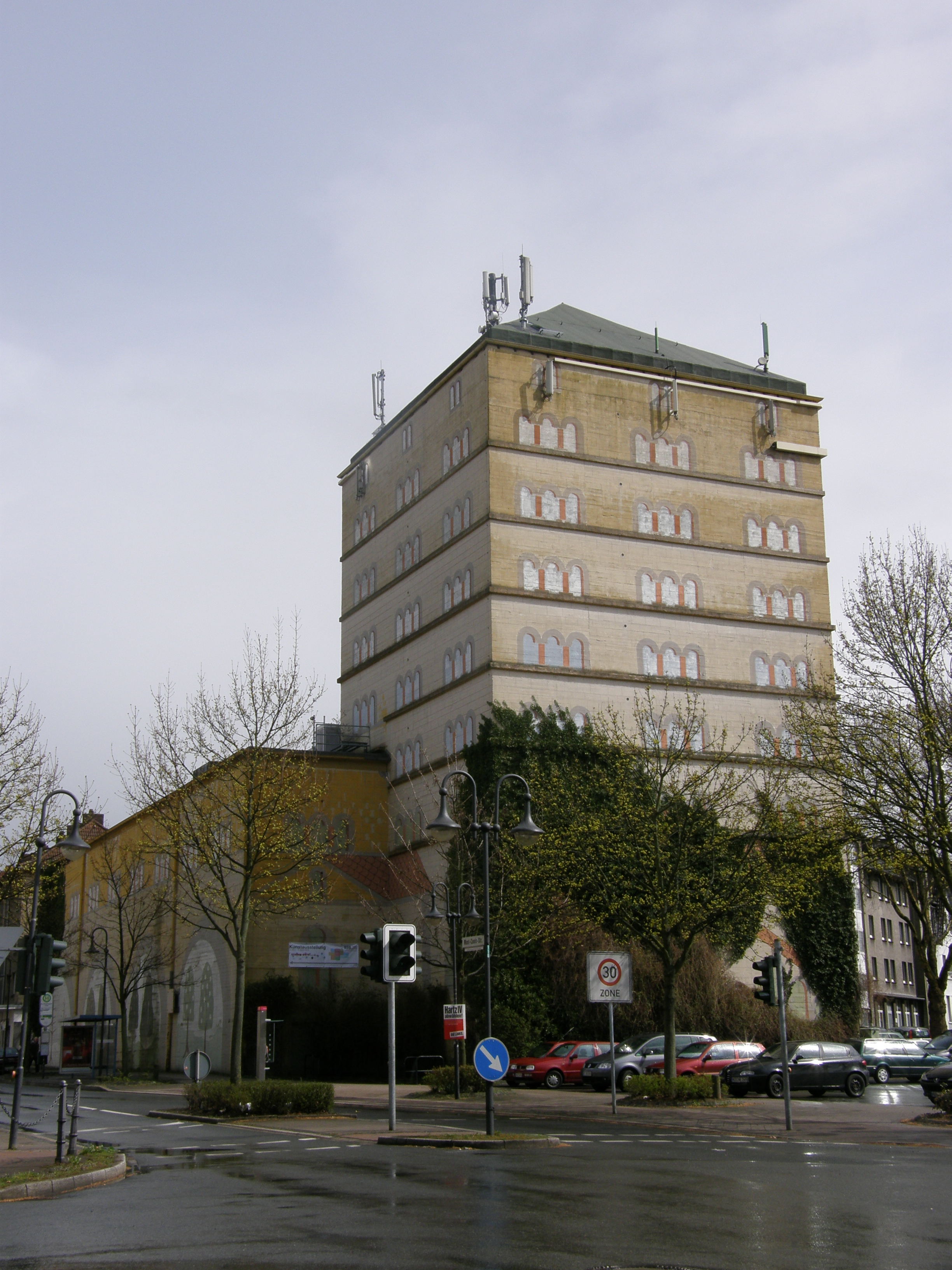 Kulturhaupstadt 2010 im Ruhrgebiet, Rojekt "Starke Orte", Stadort Herne, Luftschutzbunker Sodingen Außenansicht